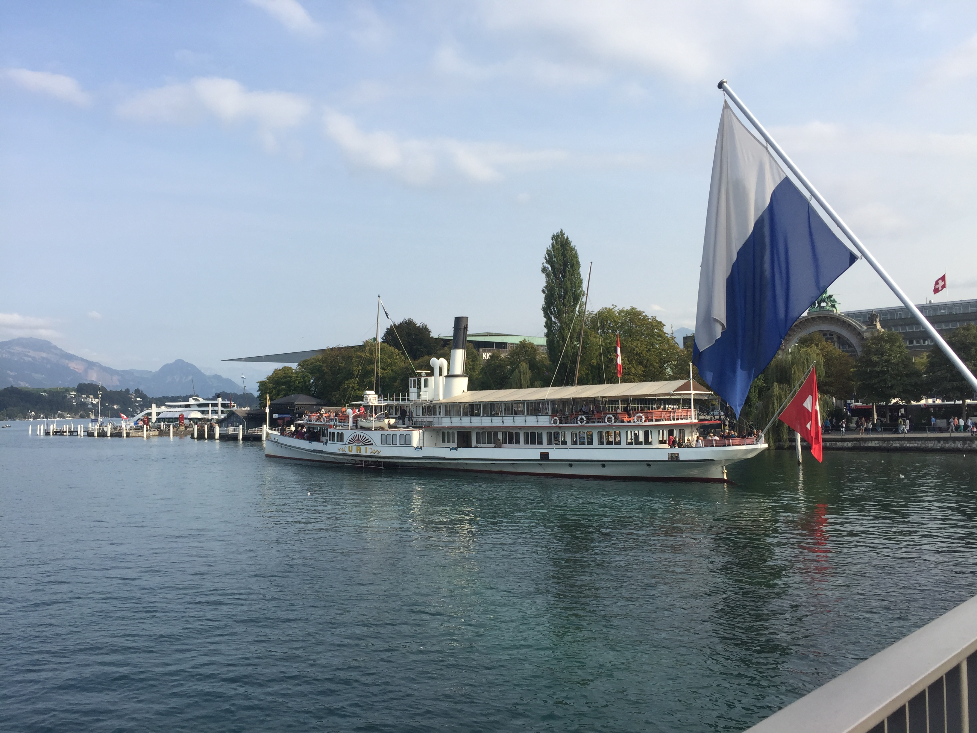 Der Raddampfer Uri am Landungssteg in Luzern